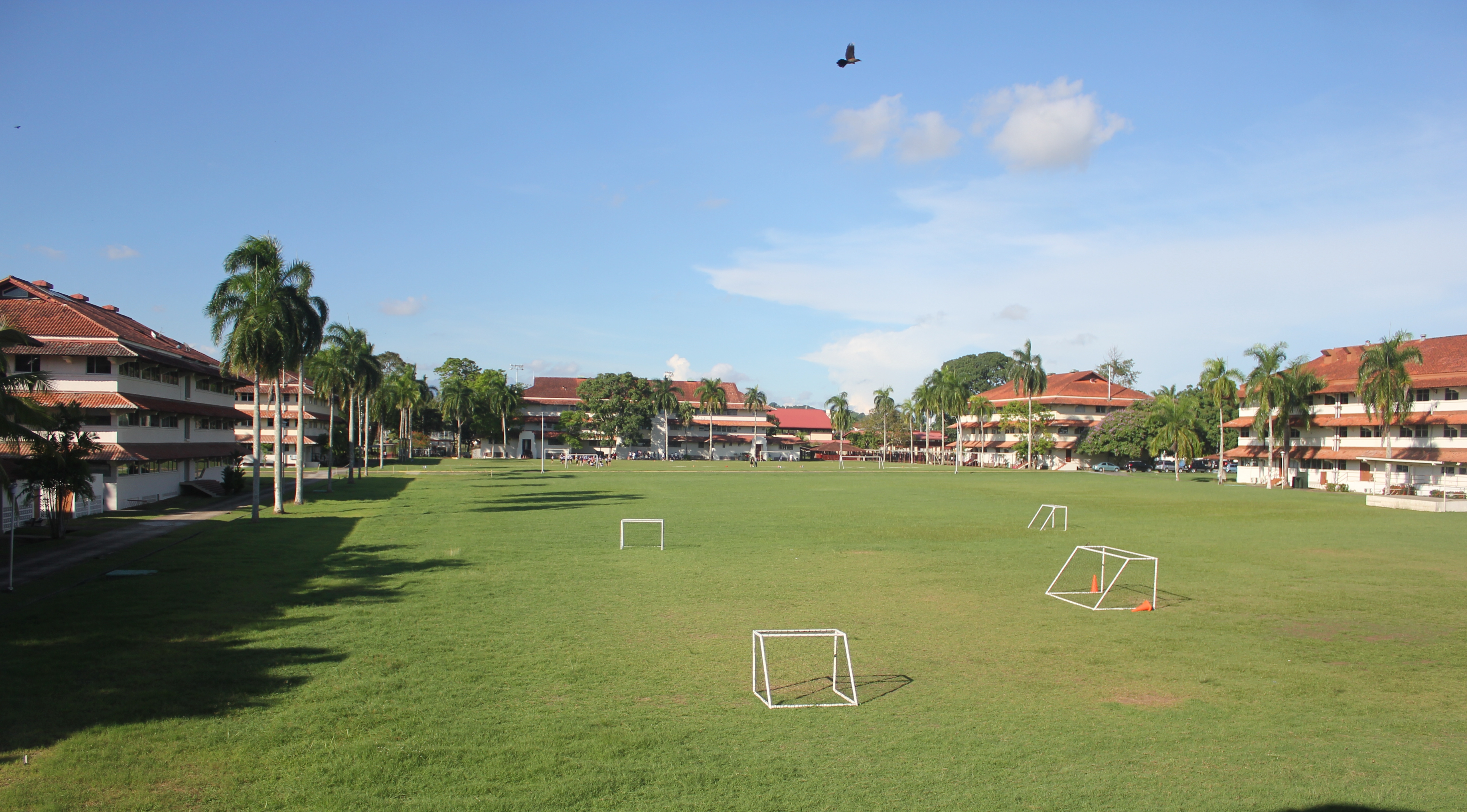 Vista del Cuadrángulo Central de Ciudad del Saber desde el Edificio 104, antigua base militar de Clayton, Panamá.